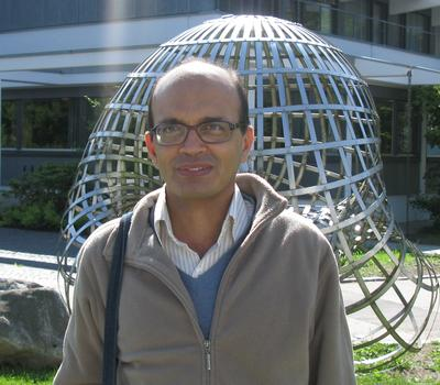 Foto di T. N. Venkataramana